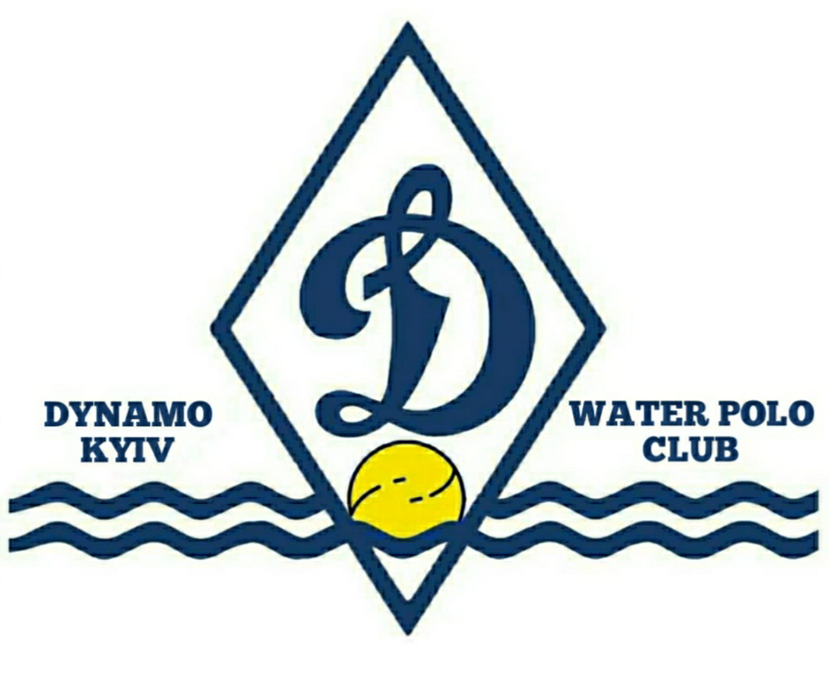 Емблема ватерпольного клубу "Динамо" Київ